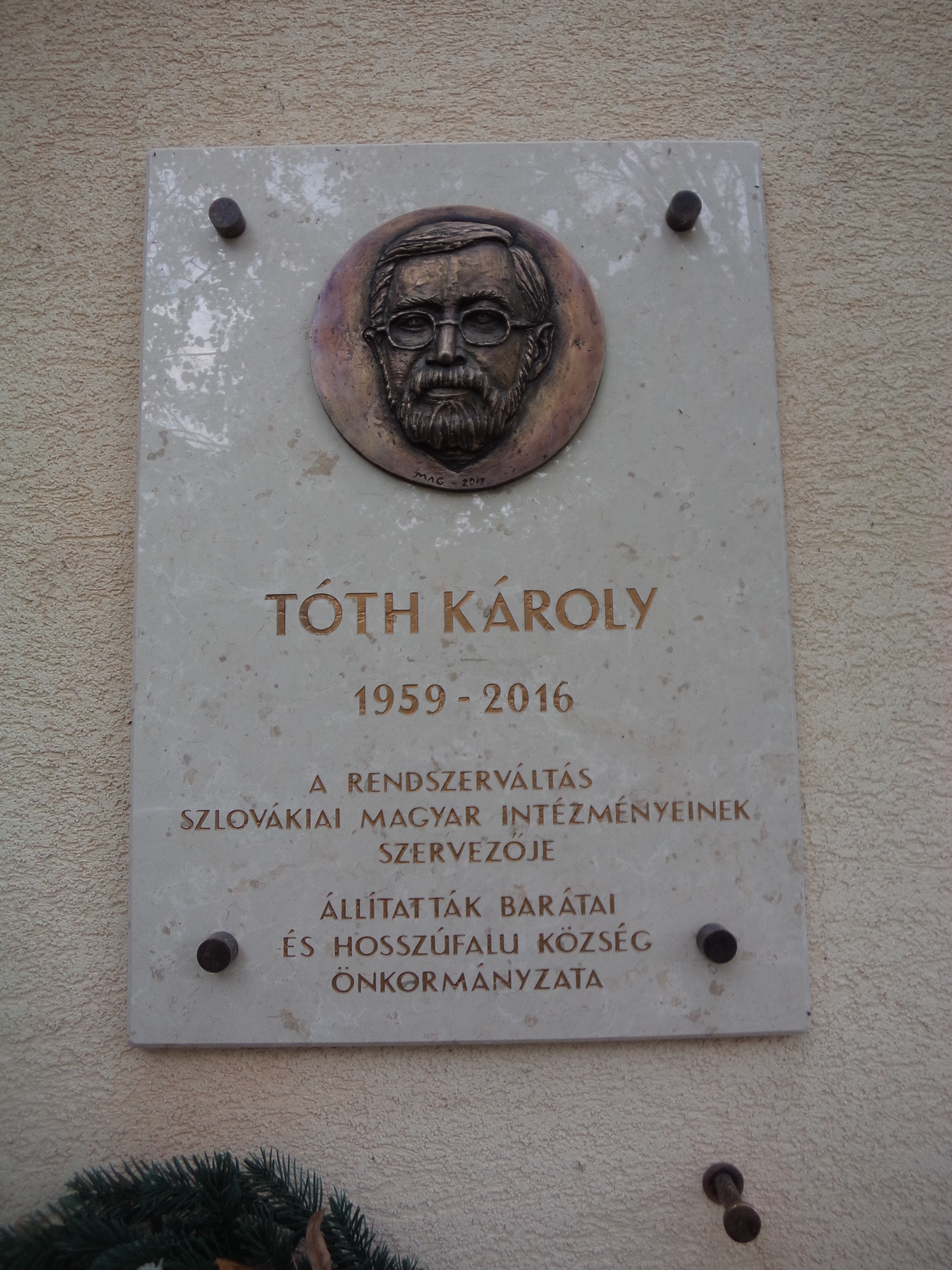 Tóth Károly irodalomtörténész